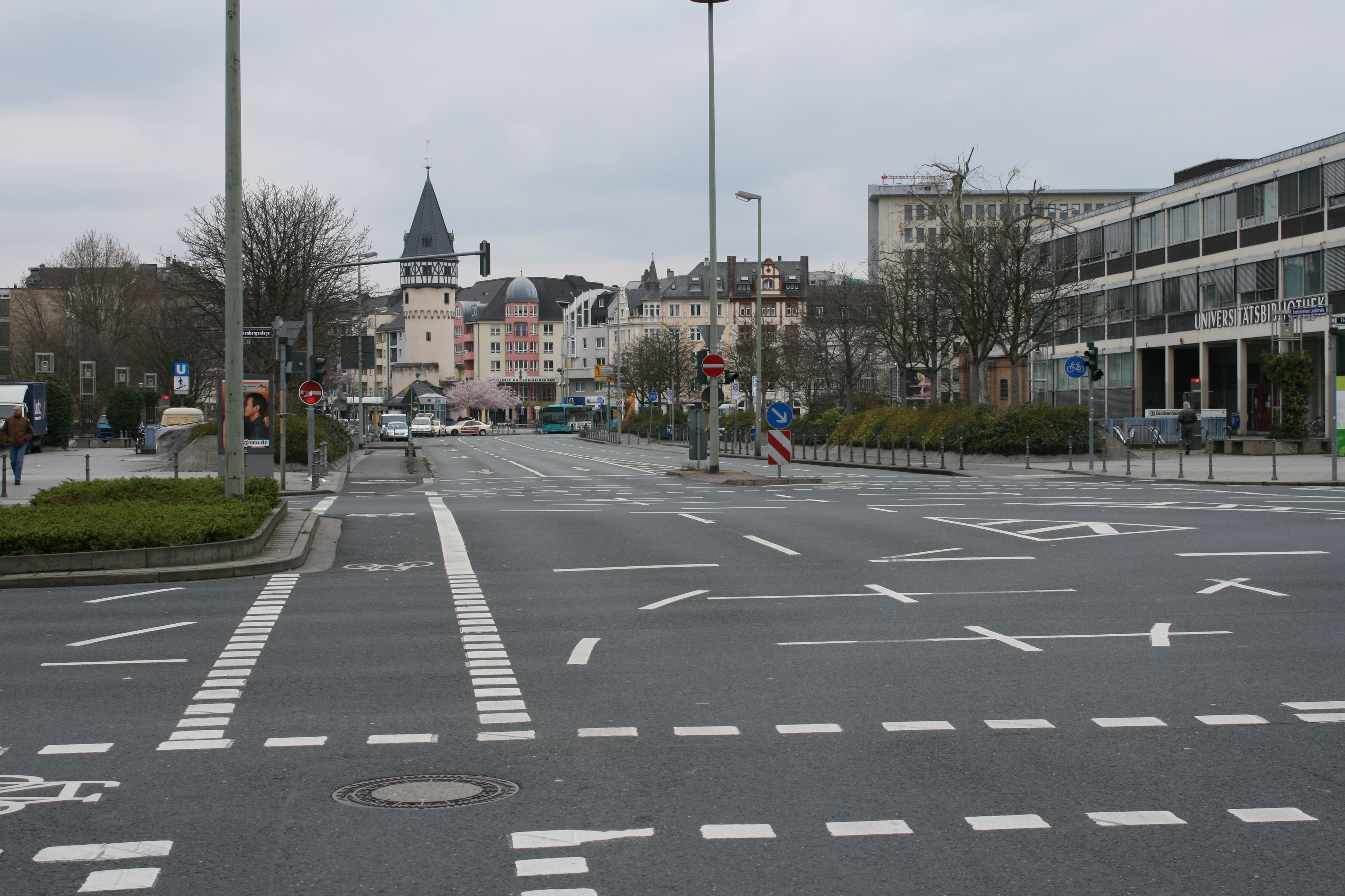 Bockenheimer Landstraße in Richtung Bockenheimer Warte an der Kreuzung Senckenberganlage